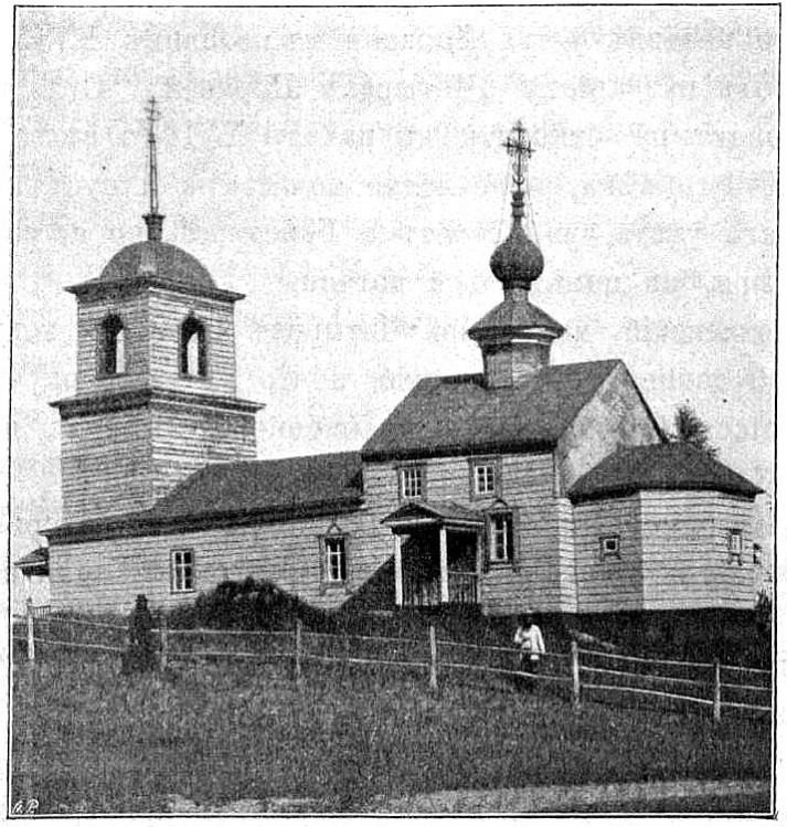 Городищи, урочище. Церковь Параскевы Пятницы. 1898 – 1899, Россия, Тульская область, Ясногорский район.